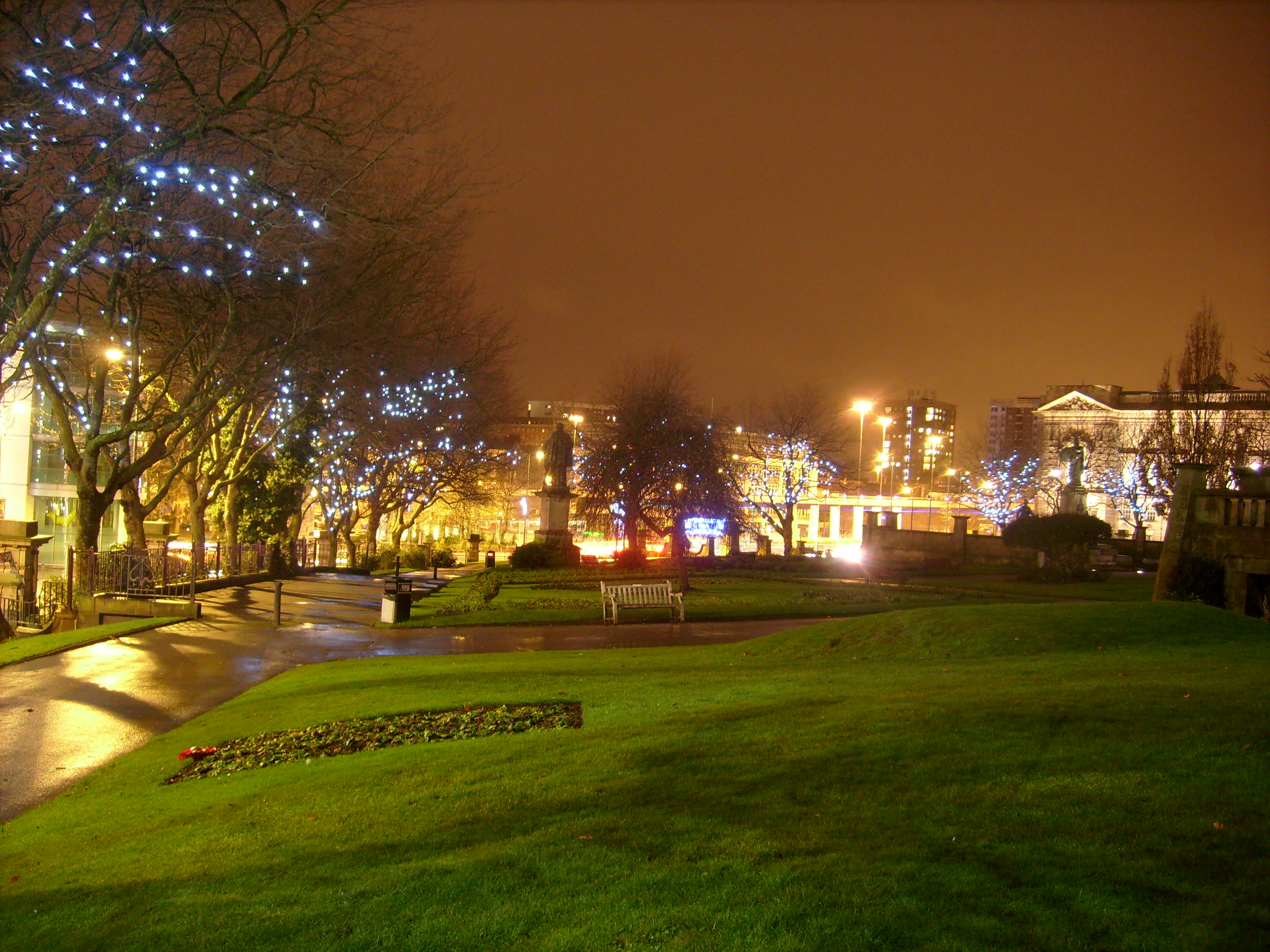 St Johns Gardens 30 Dec 2009